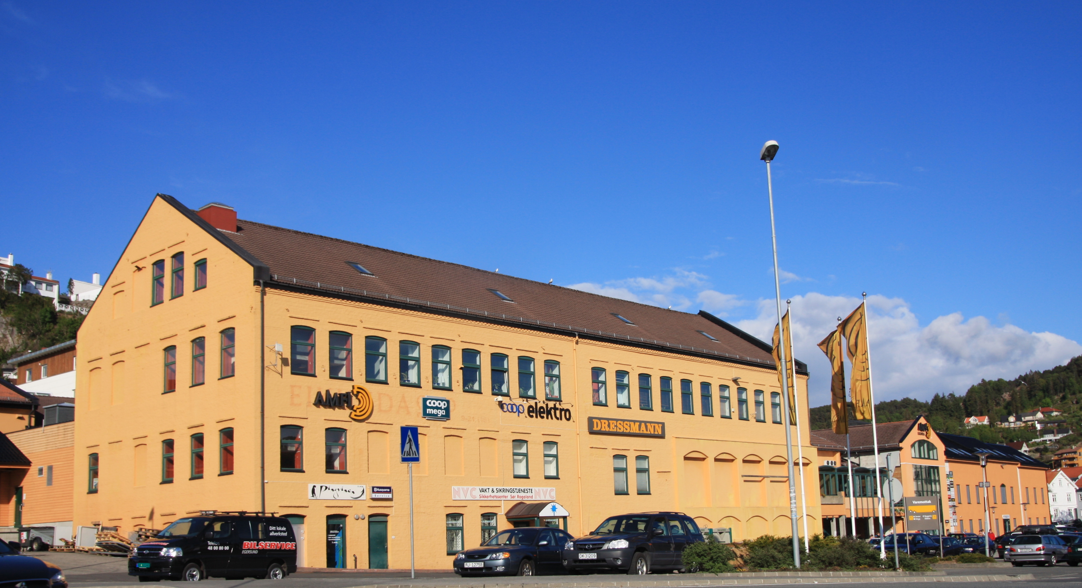 AMFI Eikunda